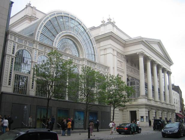 Royal Opera House Covent Garden, 2006 Foto: Marc Rohde